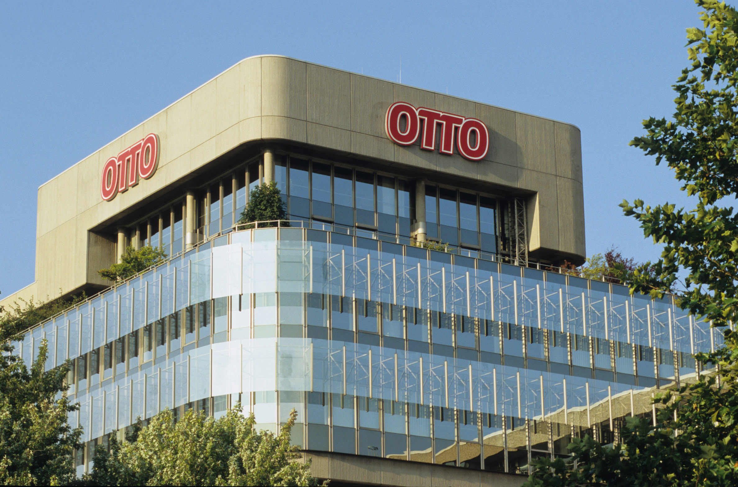 Blick auf den Hauptsitz der Otto Group in Hamburg-Bramfeld.